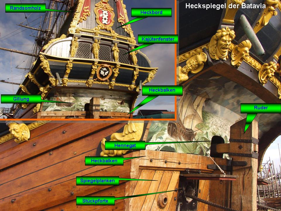 Erklärung des Aufbaus eines Heckspiegels am Beispiel der Batavia